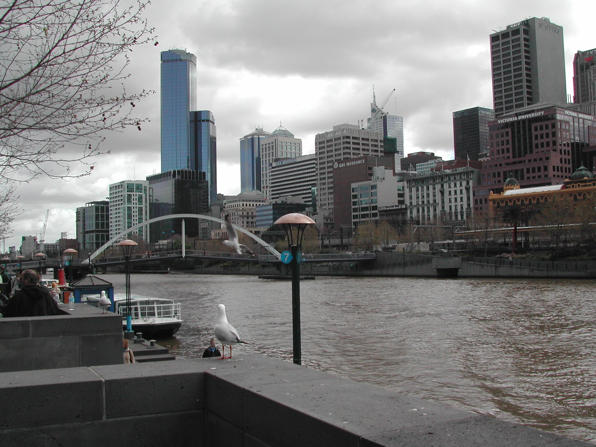 Sujet:Melbourne_Skyline.